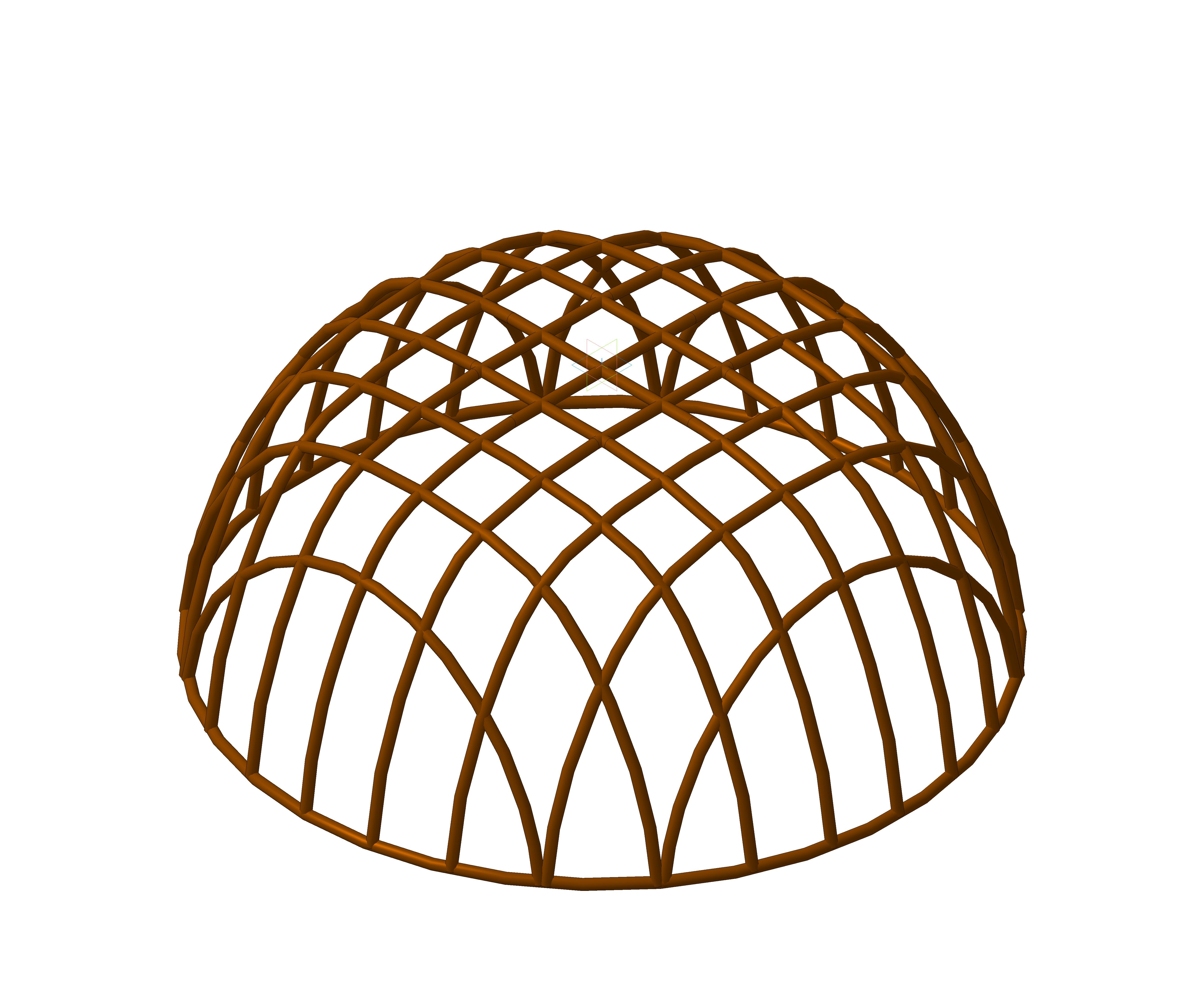 Примерный вид каркаса типичного коракла.